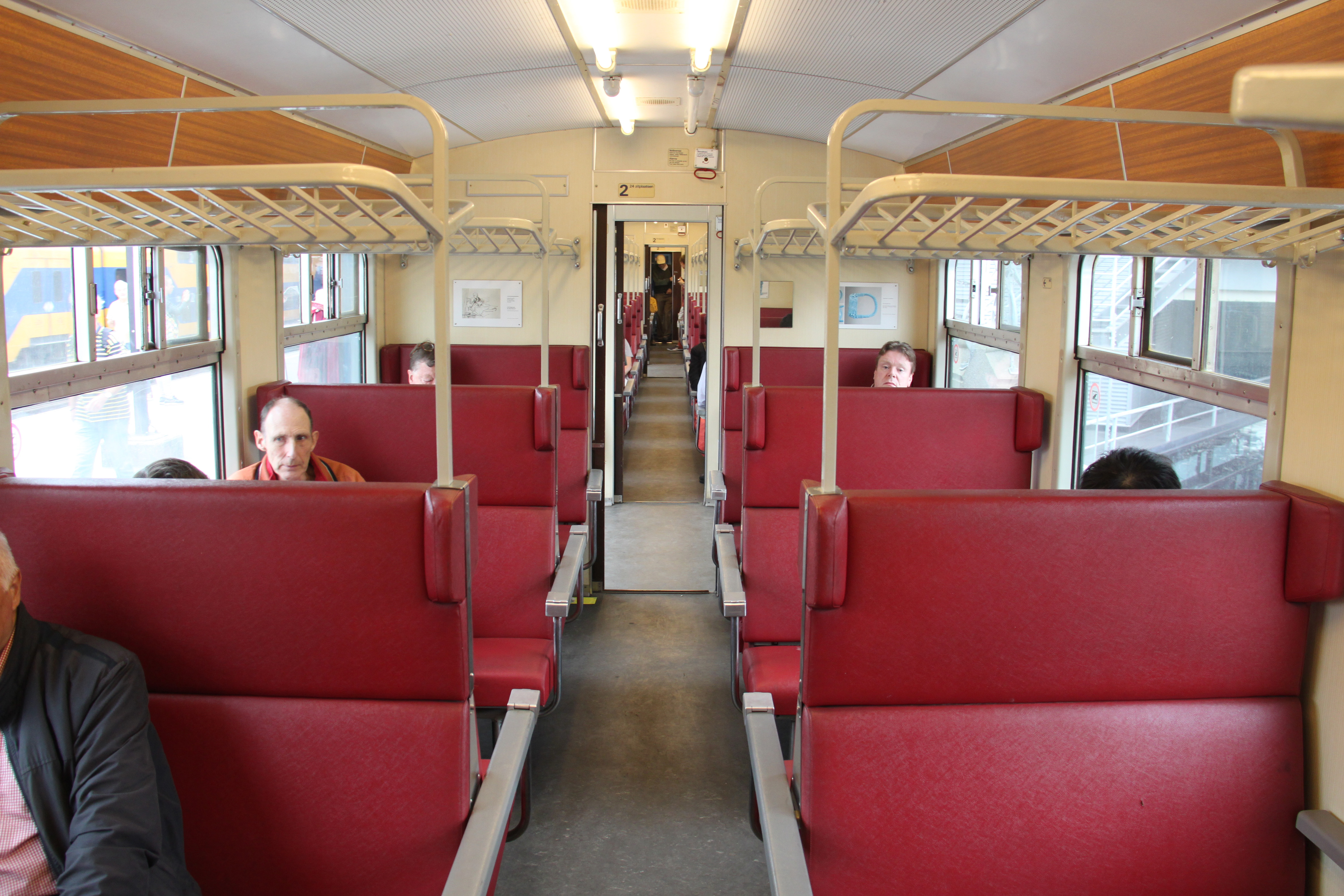 Zicht op het interieur van een rijtuig van Plan W van het Nederlands Spoorwegmuseum.